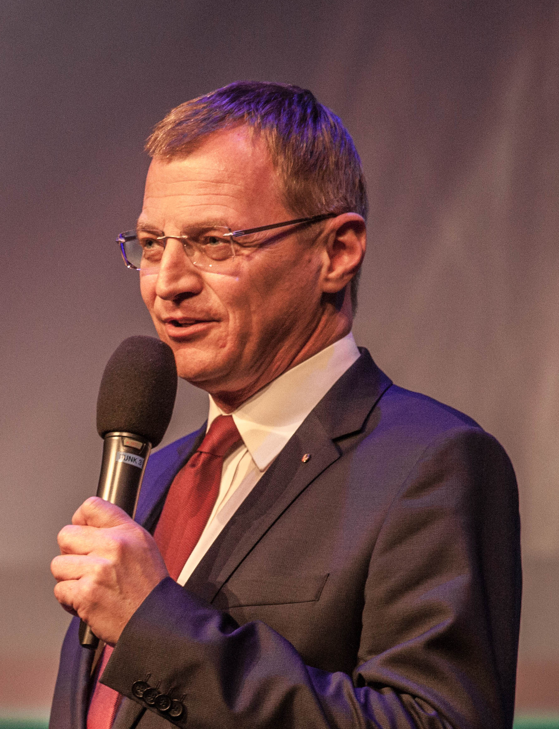 Foto von Benedikt Reiter //